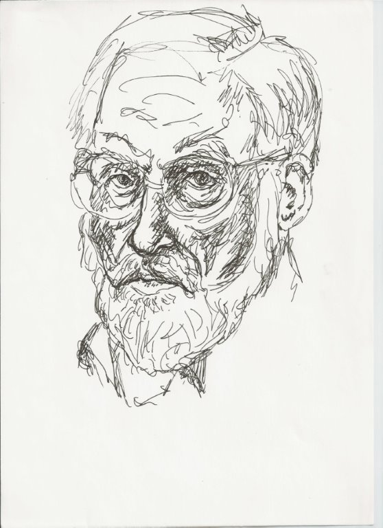 Søren Sørensen, selvportræt